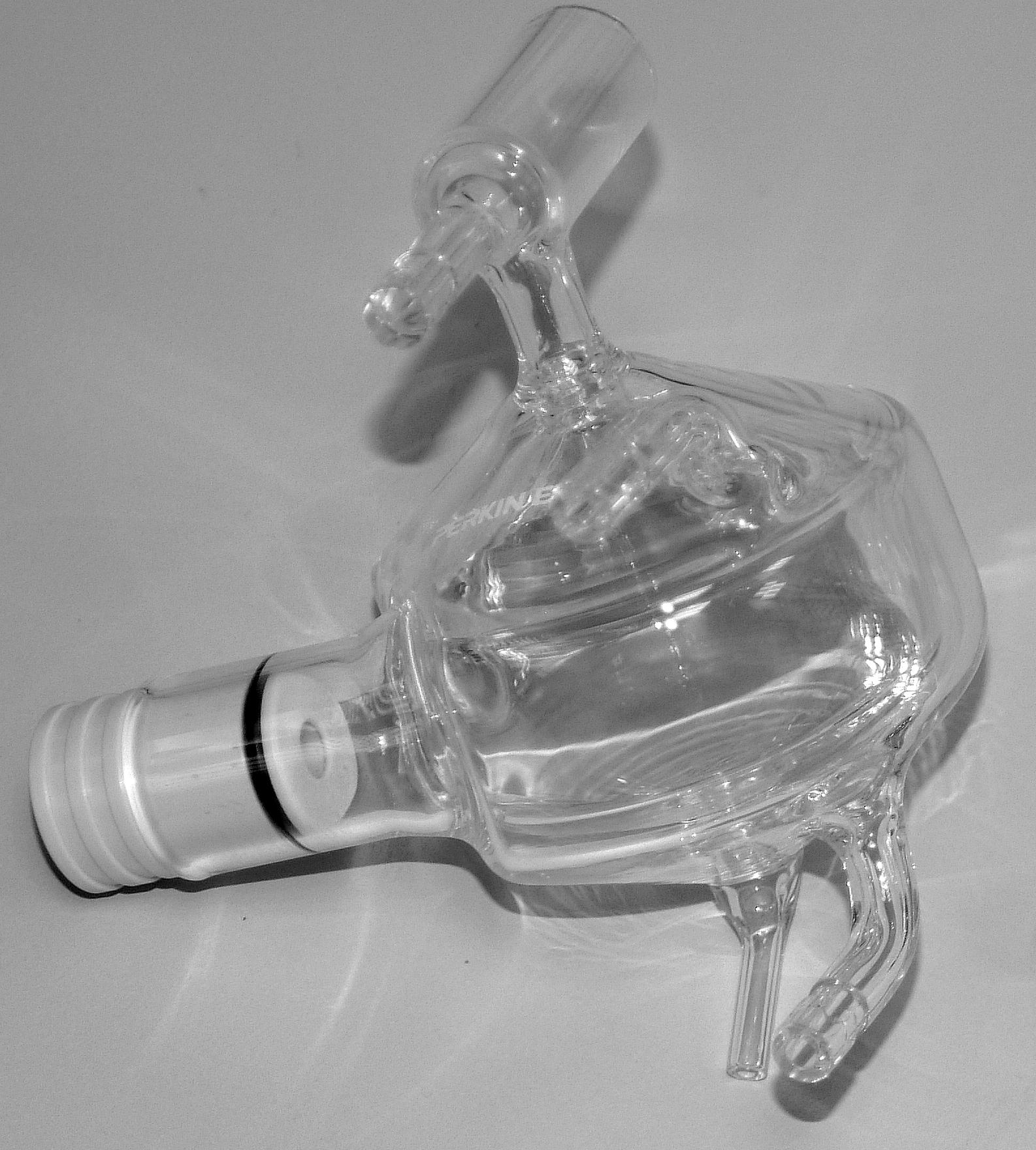 Ritaglio da File:ICP-MS abb04.jpg